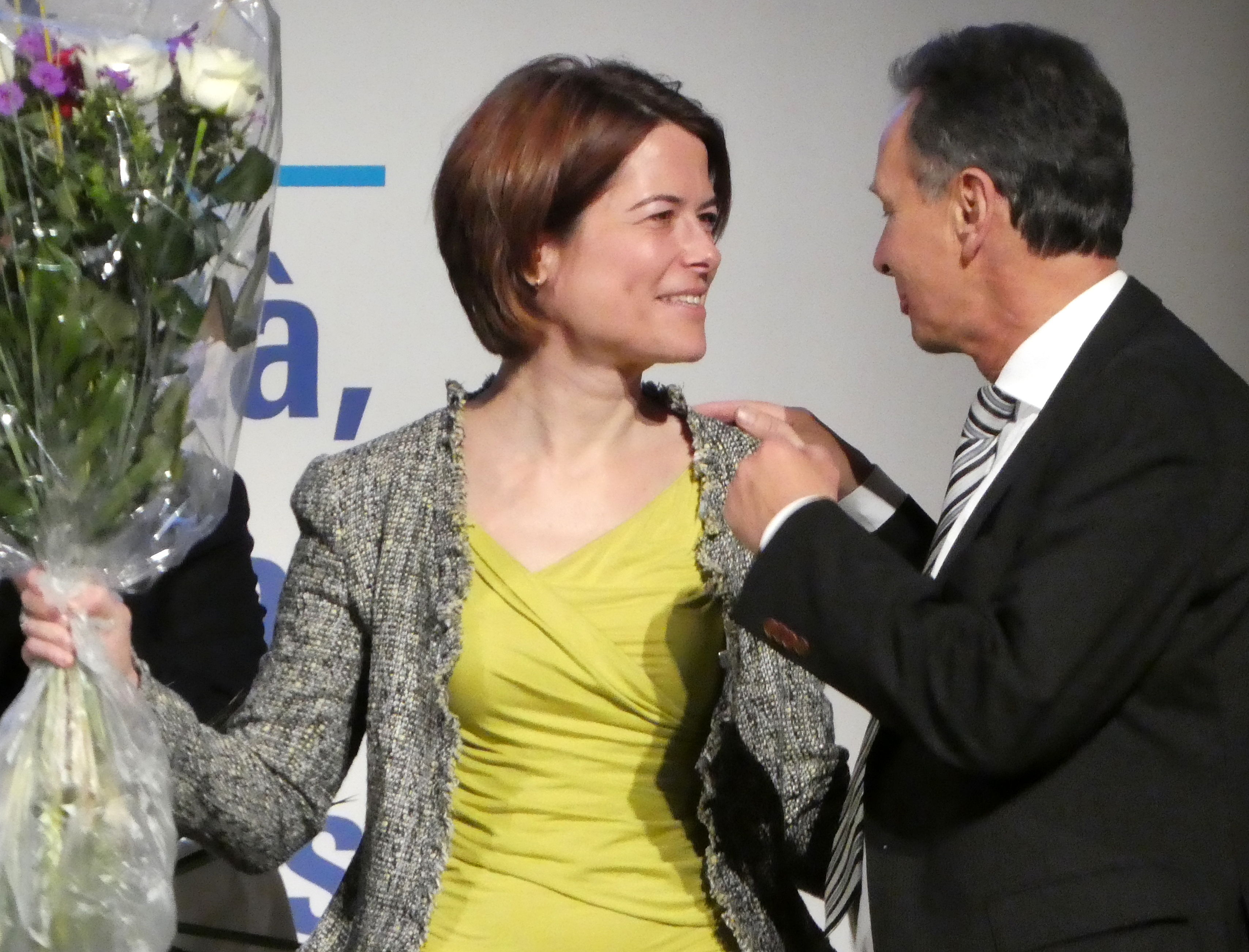 Nationalrätin Petra Gössi übernimmt von Ständerat Philipp Müller das Präsidium der FDP.Die Liberalen Schweiz